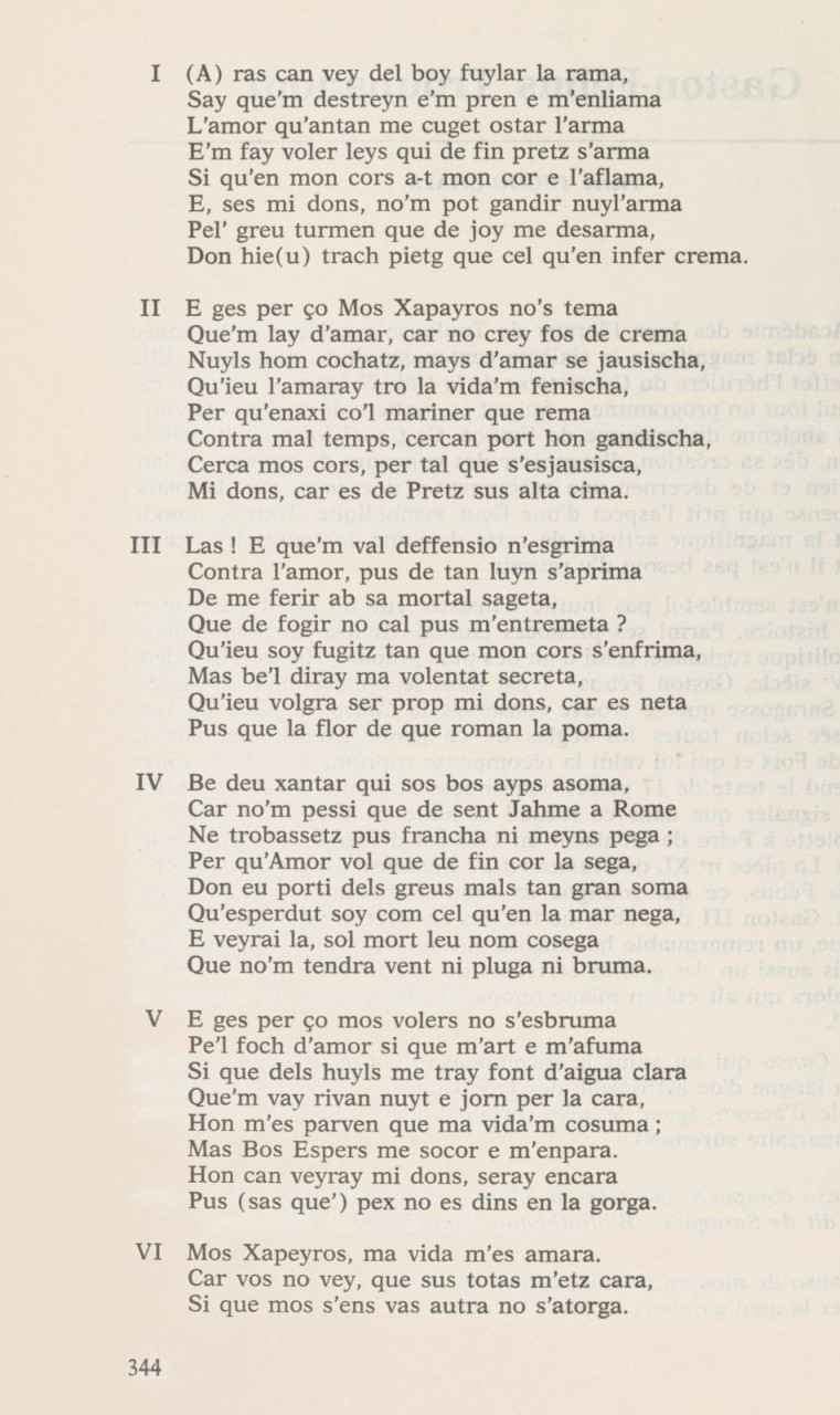 Canso, chanson, écrite par Gaston Fébus et restituée par Pierre Tucoo-Chala dans la revue "Pyrénées" en 1975.